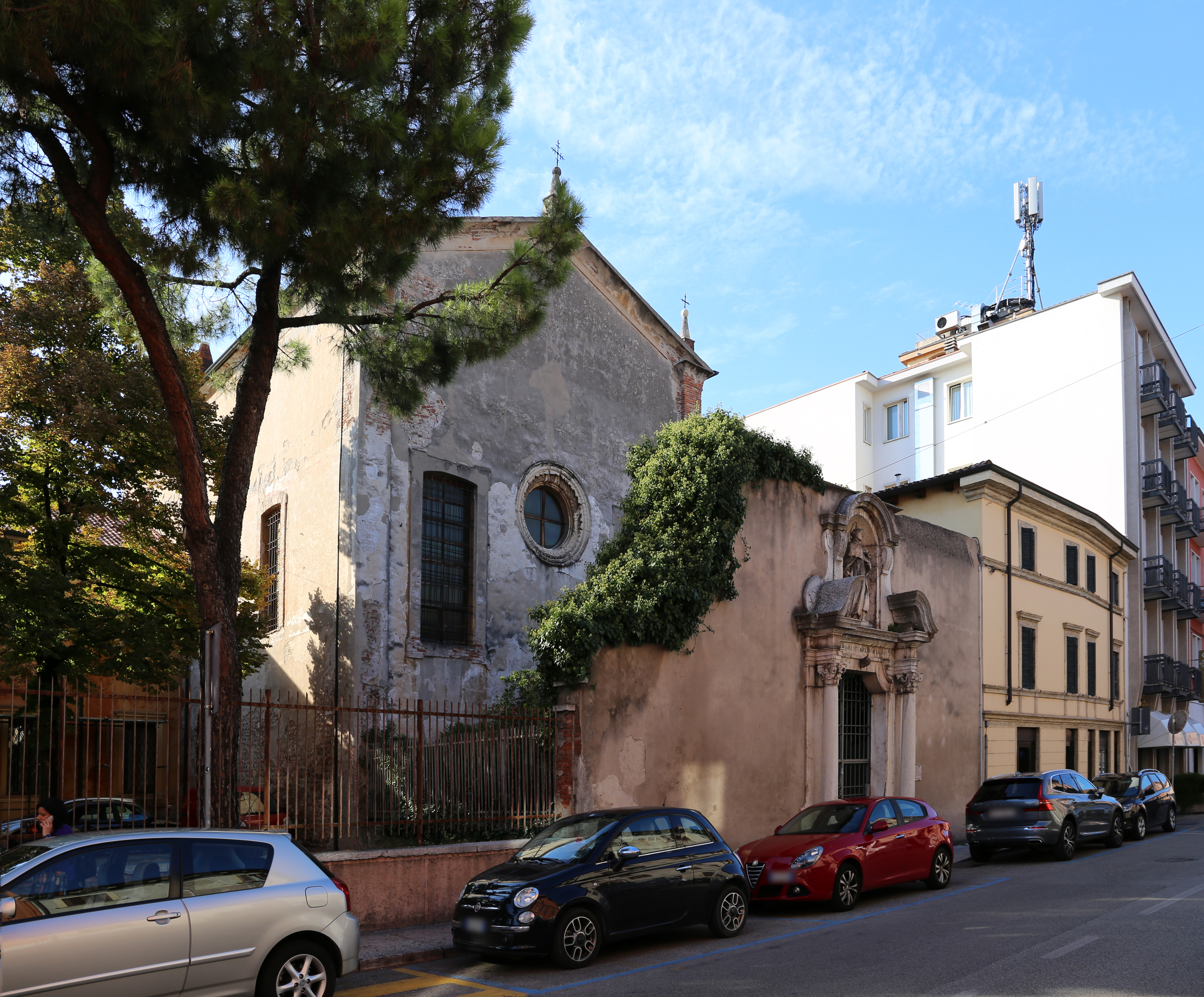 chiesa di San Domenico This is a photo of a monument which is part of cultural heritage of Italy.